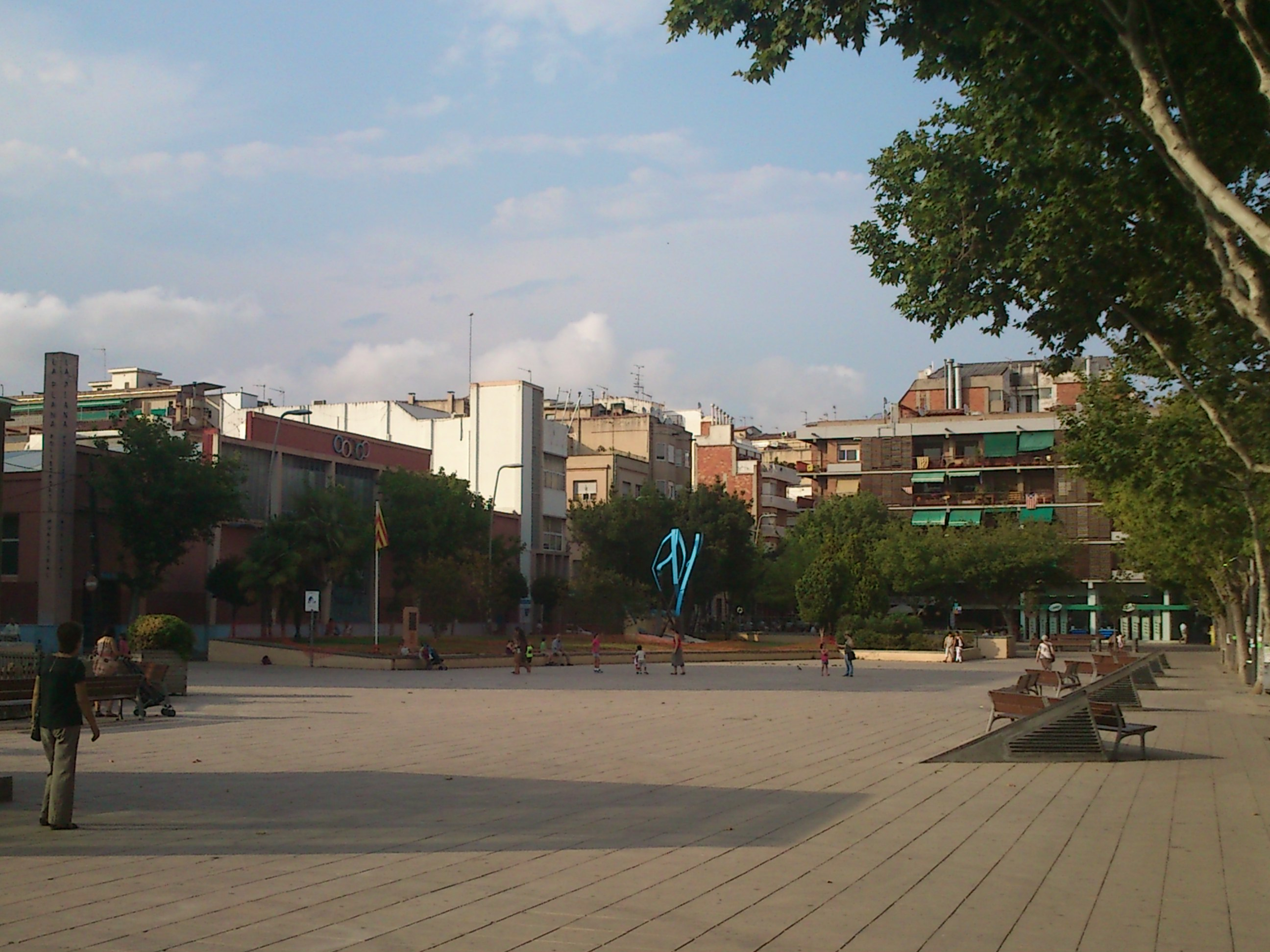 Plaça de la Plana de Badalona. Al fons pavelló esportiu homònim.